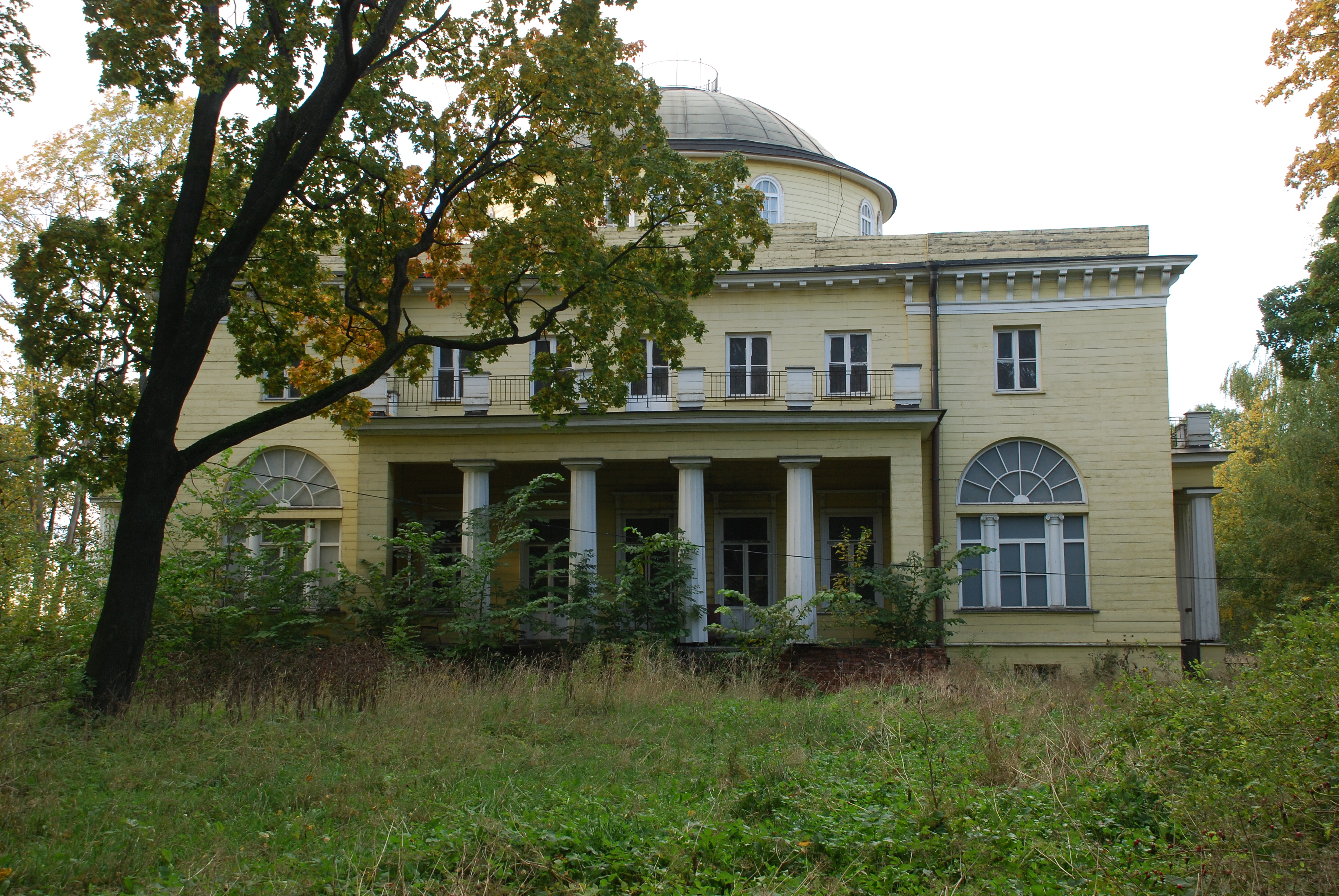 Дача Долгорукова В. В.(принца Ольденбургского П. Г.) в Петербурге, вид из сада